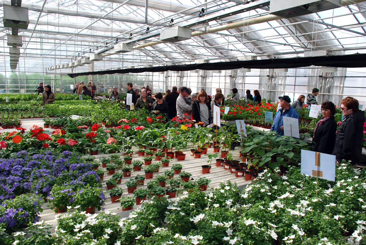 Stort utbud av sommarväxter i Gårdsbutiken.